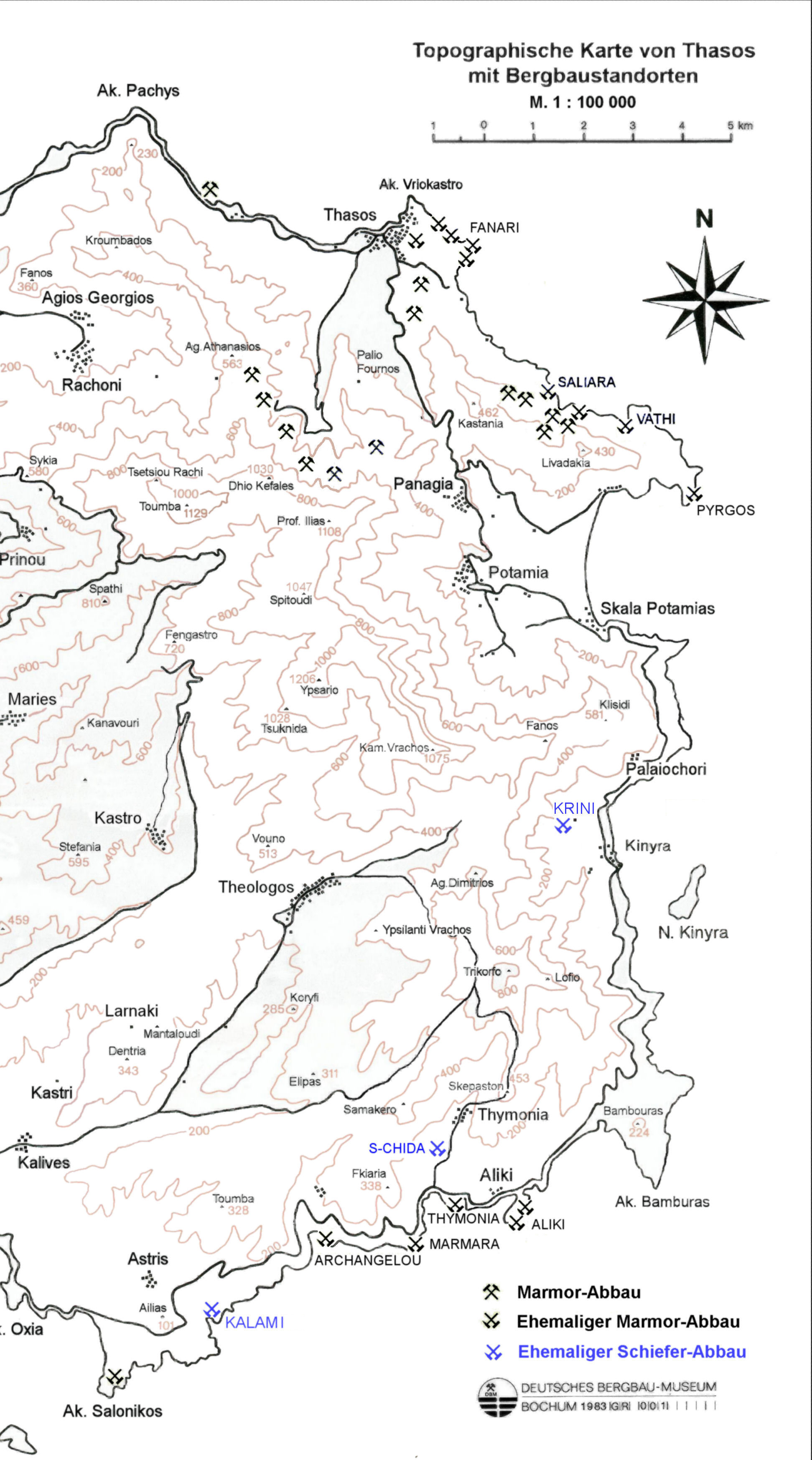 Standorte Marmor- und Gneisabbau auf Thasos